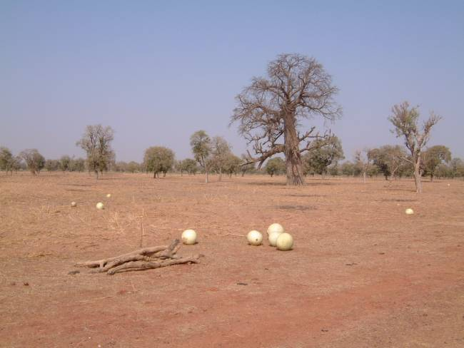 Photo d'un champ de calebasses sur la route de Ségou à Mopti (Mali)